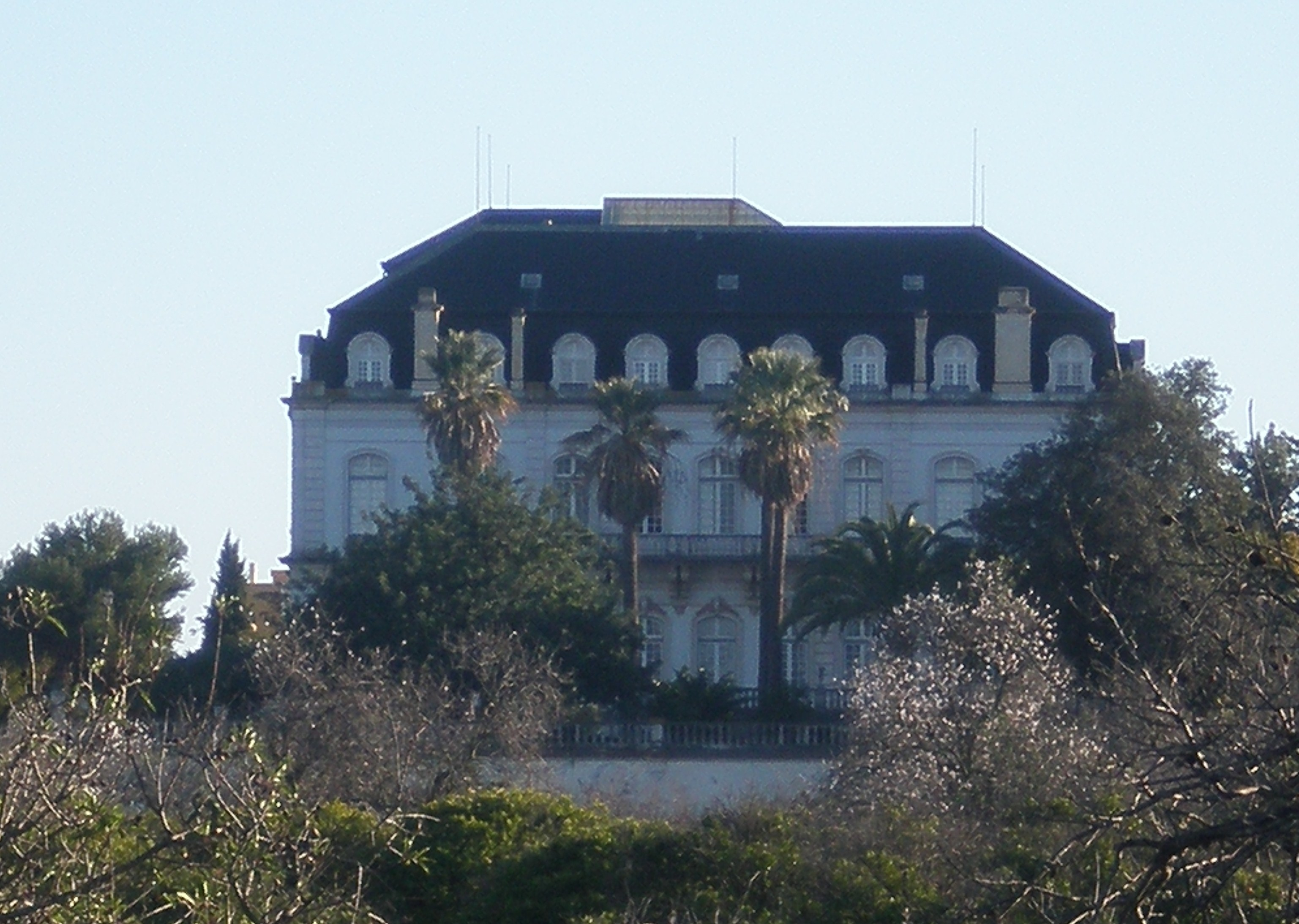 Palácio Fialho, Faro, Portugal